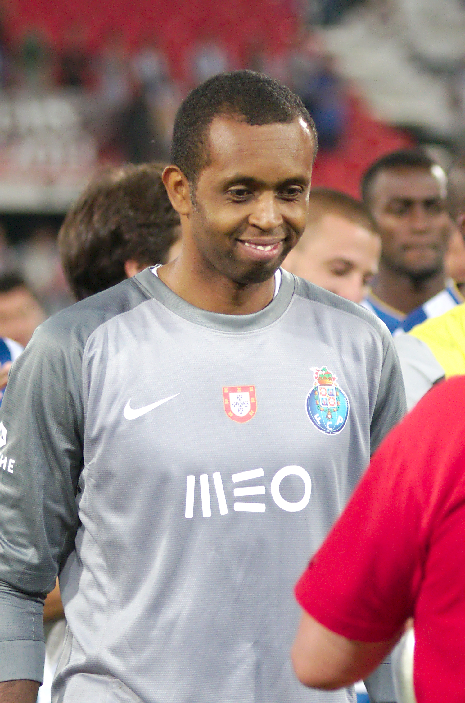 Valais Cup 2013 - OM-FC Porto - 20130713 - Helton